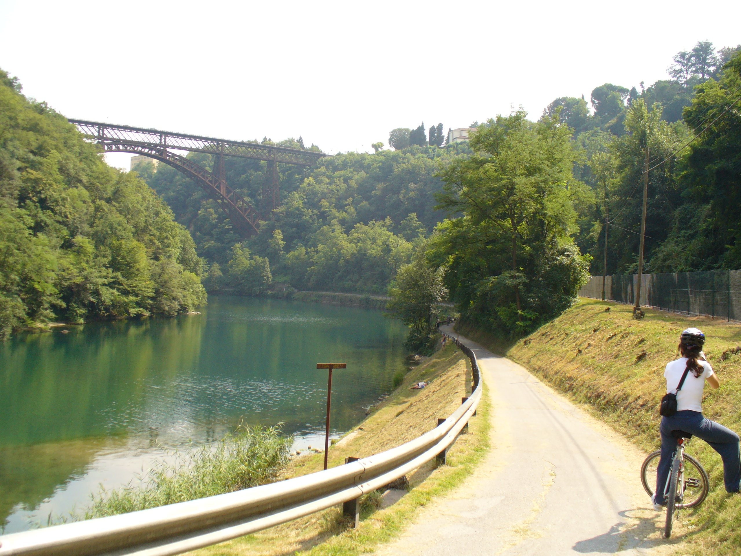 Ciclabile sotto il ponte di Paderno d'Adda